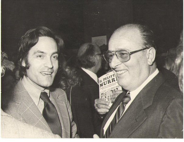 1974 (settembre) a Bologna: col regista Mauro Bolognini, nel giorno della premiere del film "Fatti di gente per bene". (Foto di Paolo Ferrari)